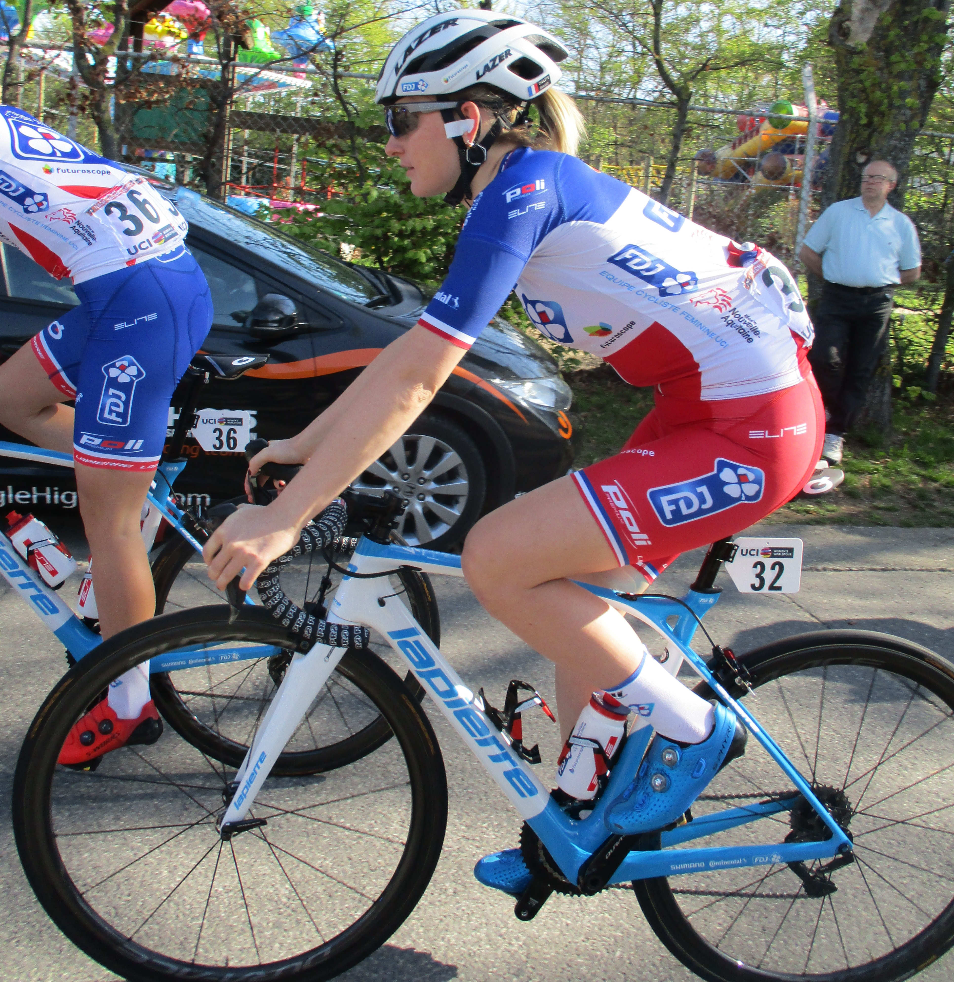 Start van de Waalse Pijl 2018 op de Mur van Huy.